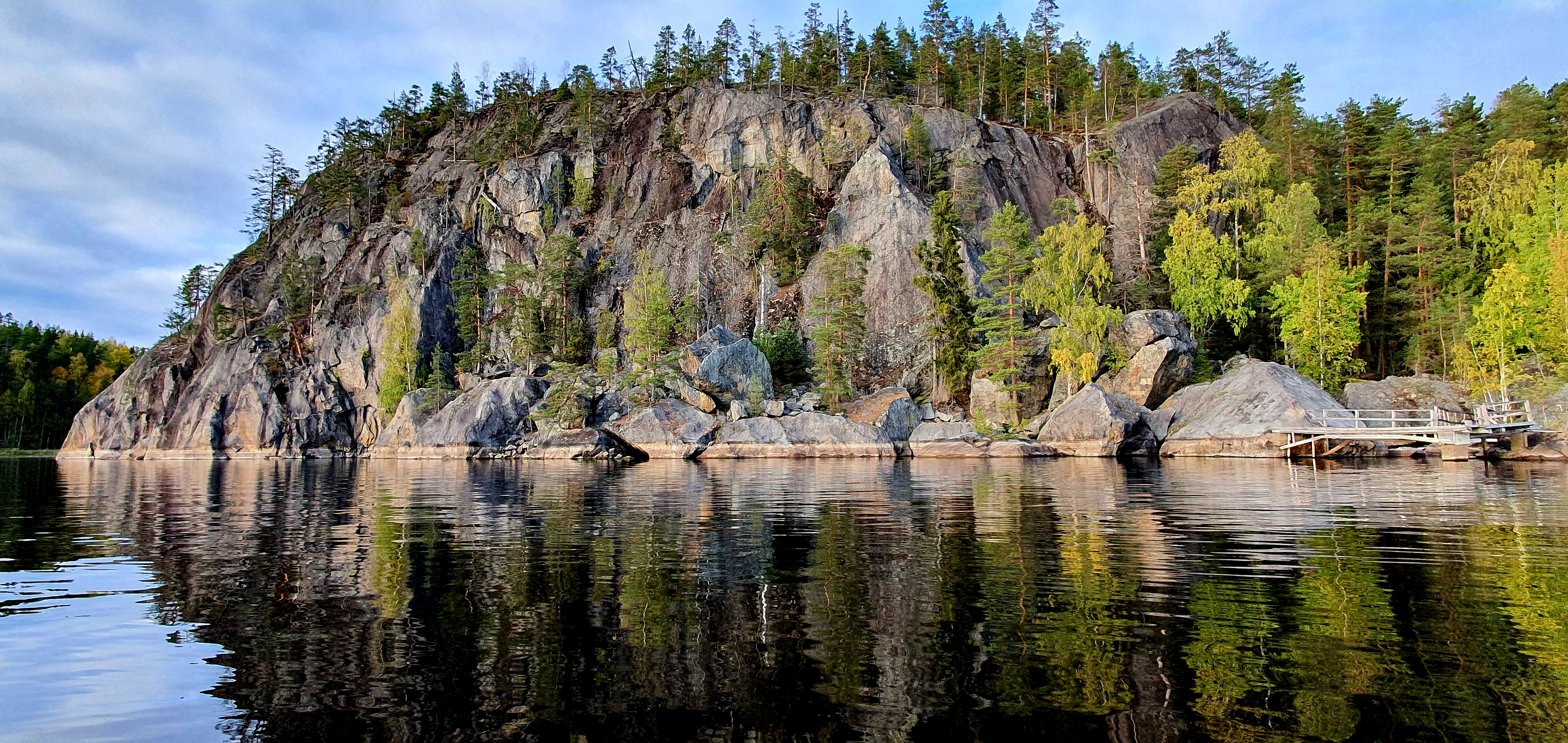 Linnavuori at the lake Saimaa, Sulkava, Finland